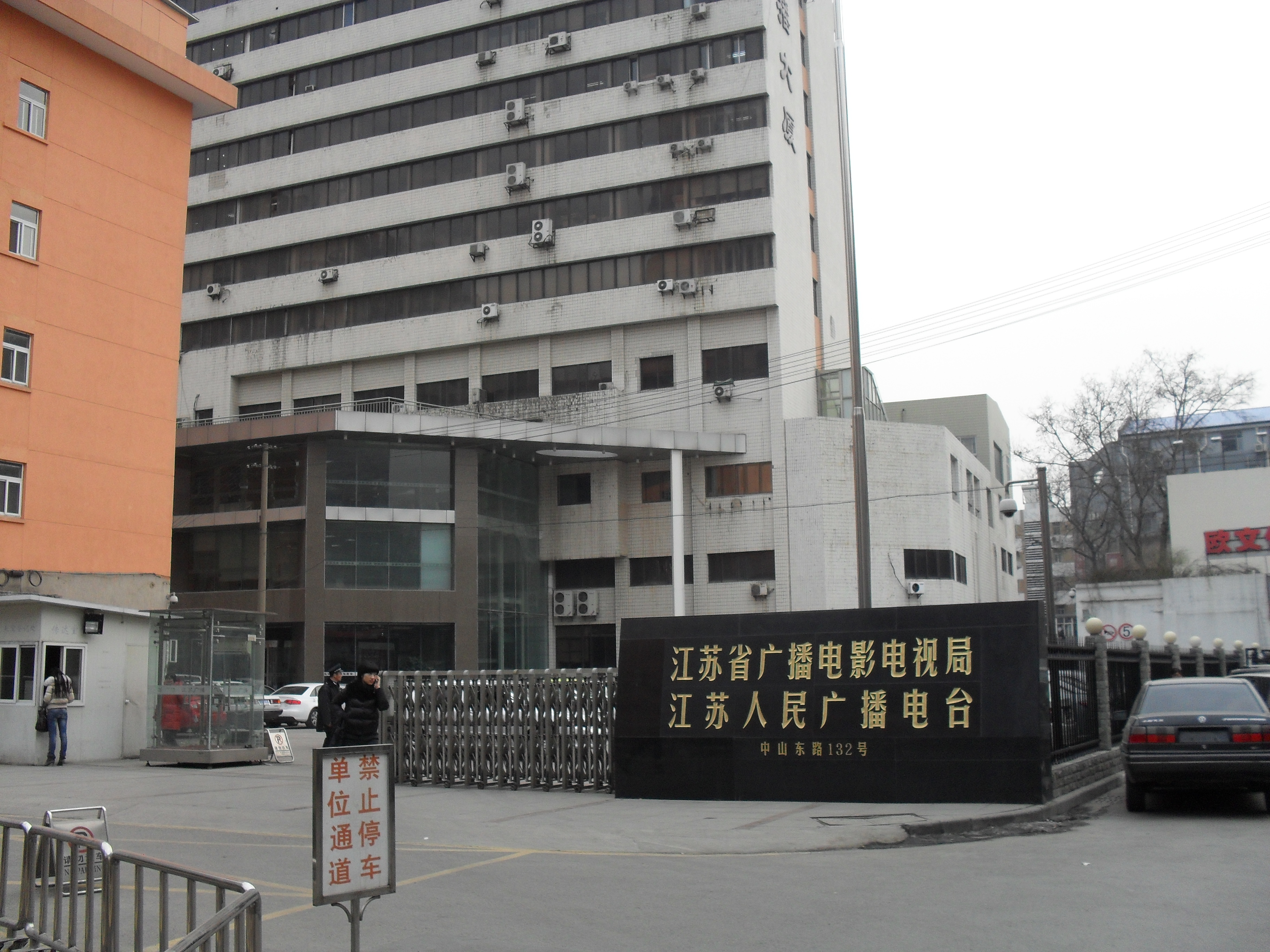 南京中山东路江苏广播电台